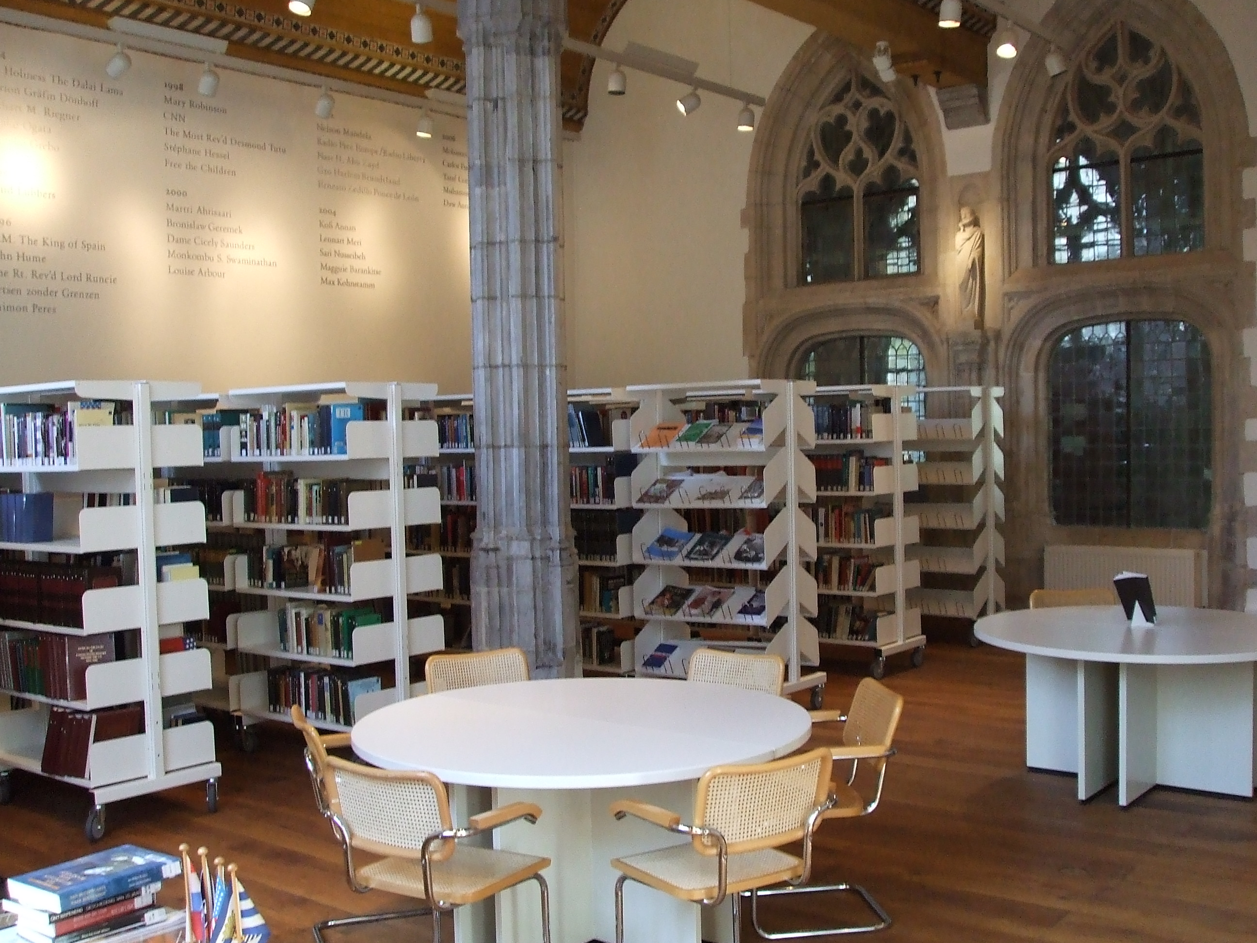 Zicht op een deel van de bibliotheek van het Roosevelt Institute for American Studies tegenwoordig gevestigd in een deel van de voormalige Abdij van Middelburg. Zie ook: Roosevelt Study Center.